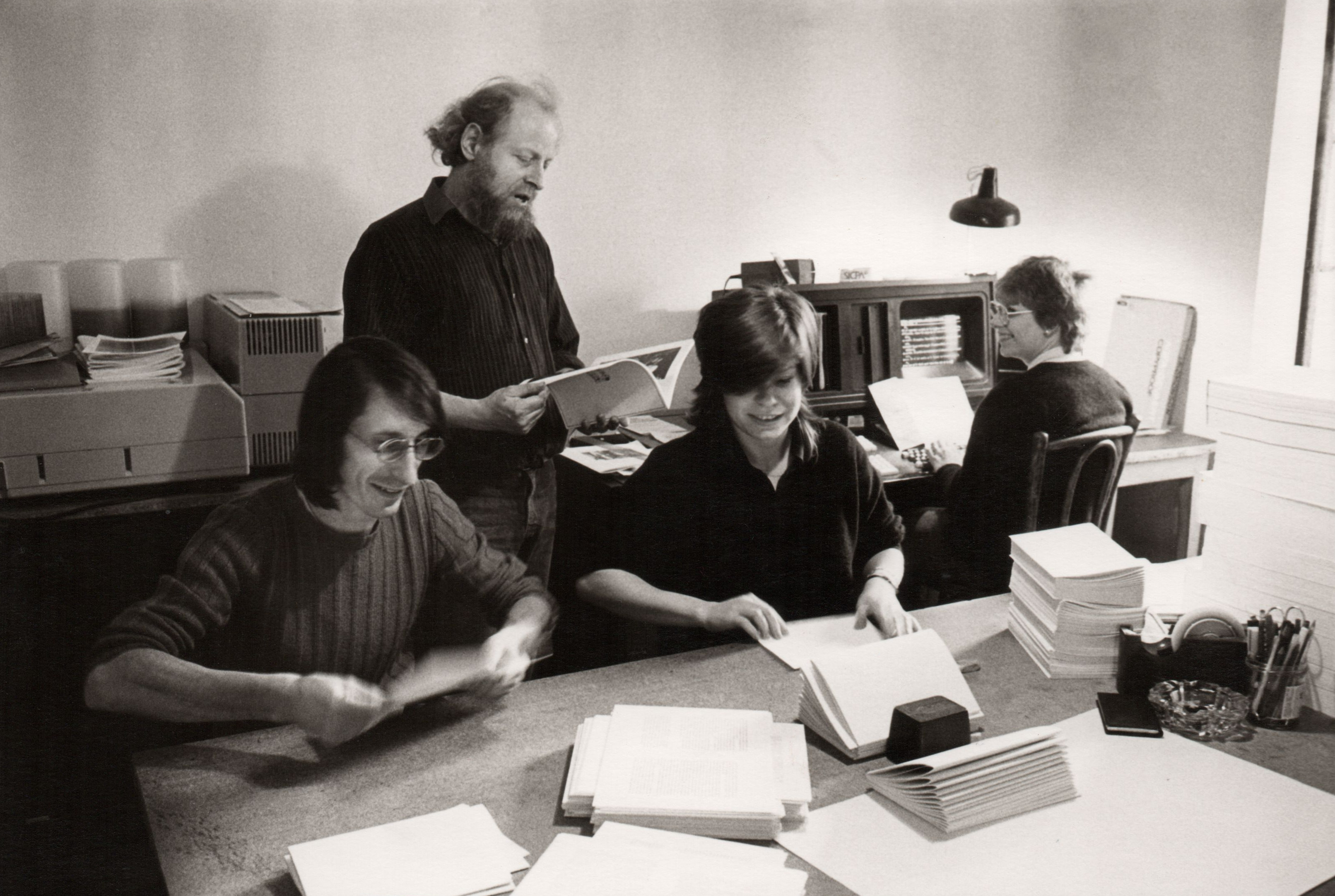 L'atelier des éditions Plein Chant vers la fin des années 1980.